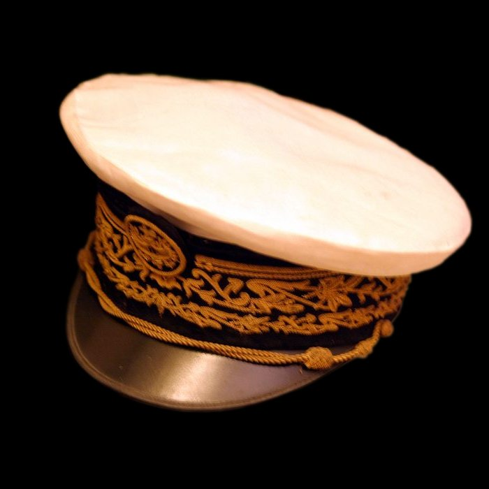 Préfet cap of Félix Éboué. On display at the Musée de l'armée.